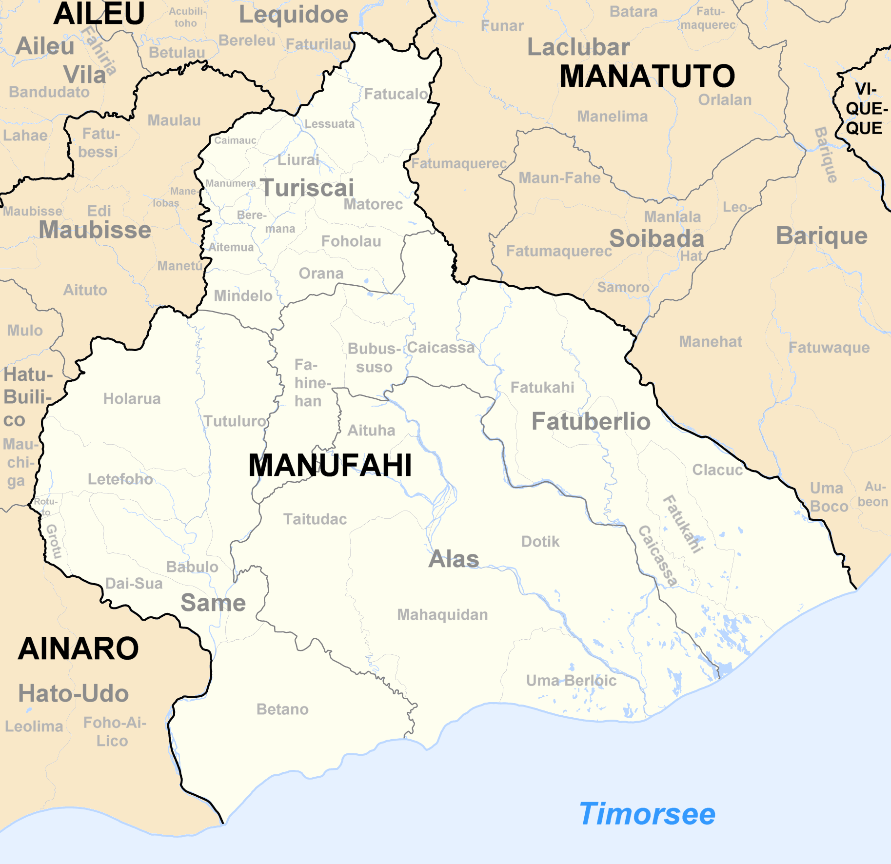 Sucos des Distrikts Manufahi/Osttimor nach der Neustrukturierung 2004